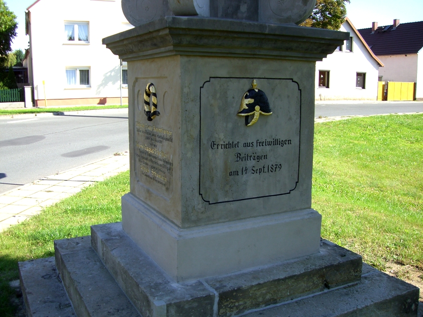 Stolzenhain, Denkmal für die Opfer des Deutsch-Französischen Krieges 1870/71